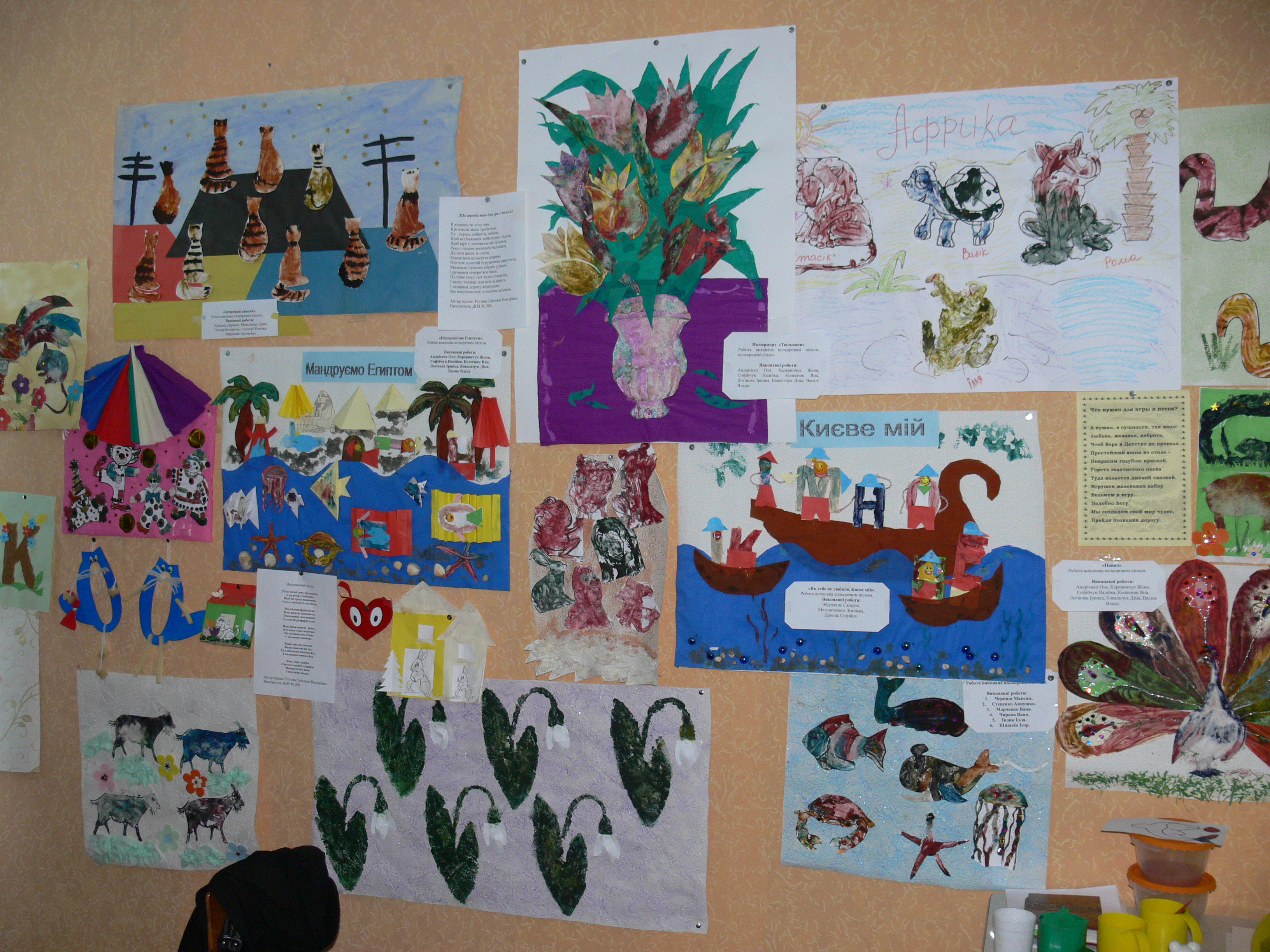 На фотографії зображено зразки творчих робіт дітей дошкільного віку, створених за допомогою пісочної технології (кольоровий пісок). Тематика творів відповідає темам на заняттях.